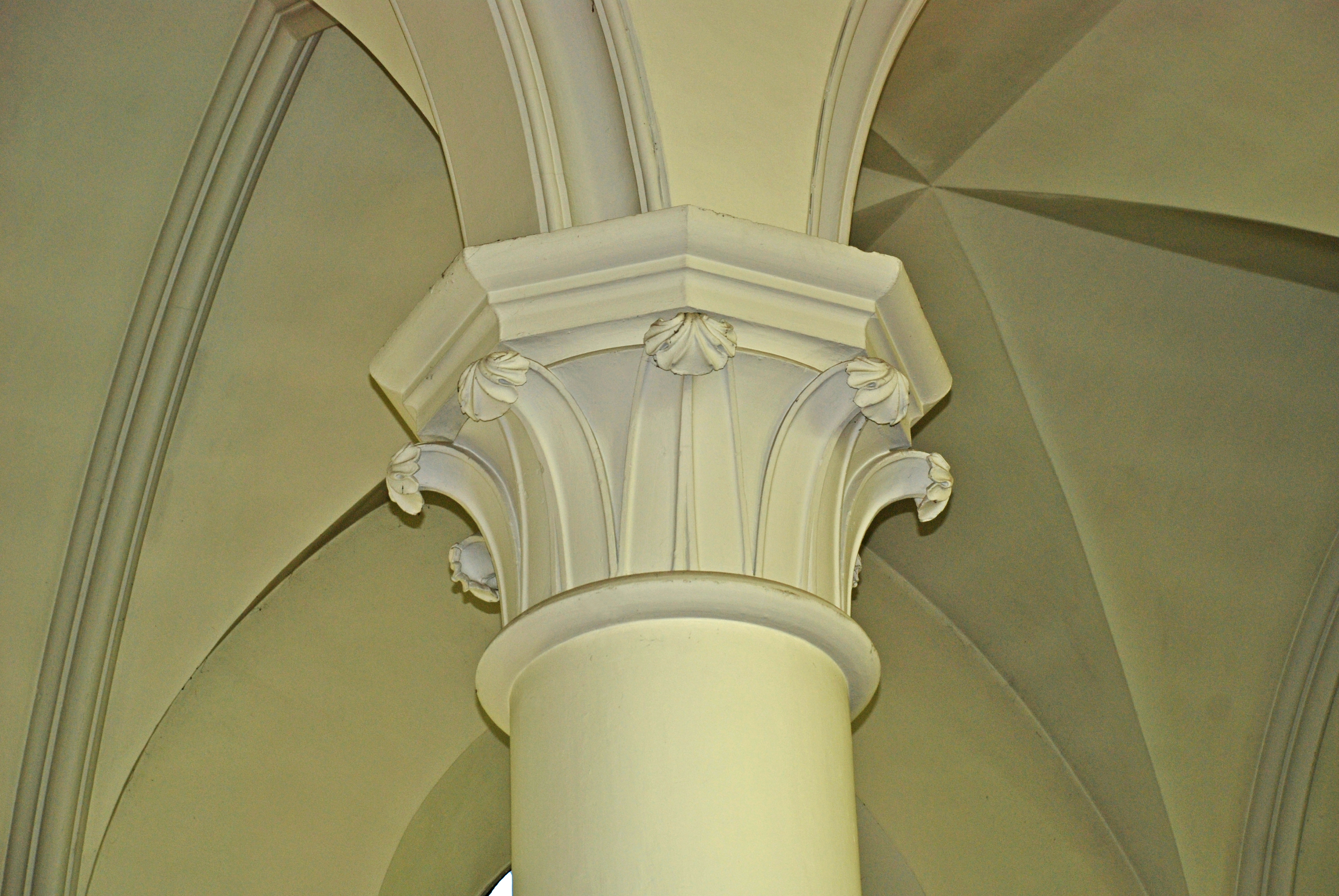 Belgique - Brabant wallon - Ottignies-Louvain-la-Neuve - Céroux - église Notre-Dame de Bon Secours (néo-gothique, Antoine Moreau, 1848)